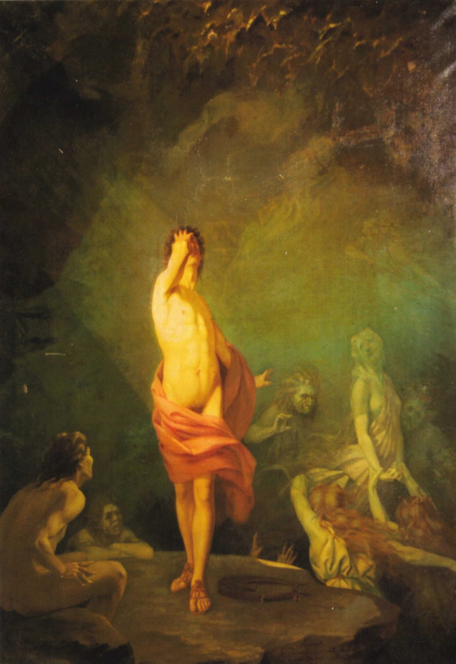 Orfeu în infern cunoscut și ca Orfeu scăpând de Euridice în Infern, ulei/pânză, 23x94cm, semnat și datat stânga jos: M. Ștefănescu Roma 1871 - Muzeul Național de Artă al României